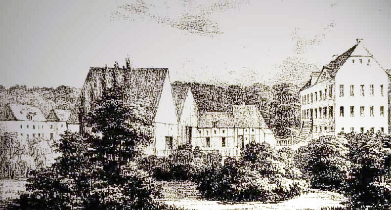 Haus Borg in Budberg, Blick von Süden